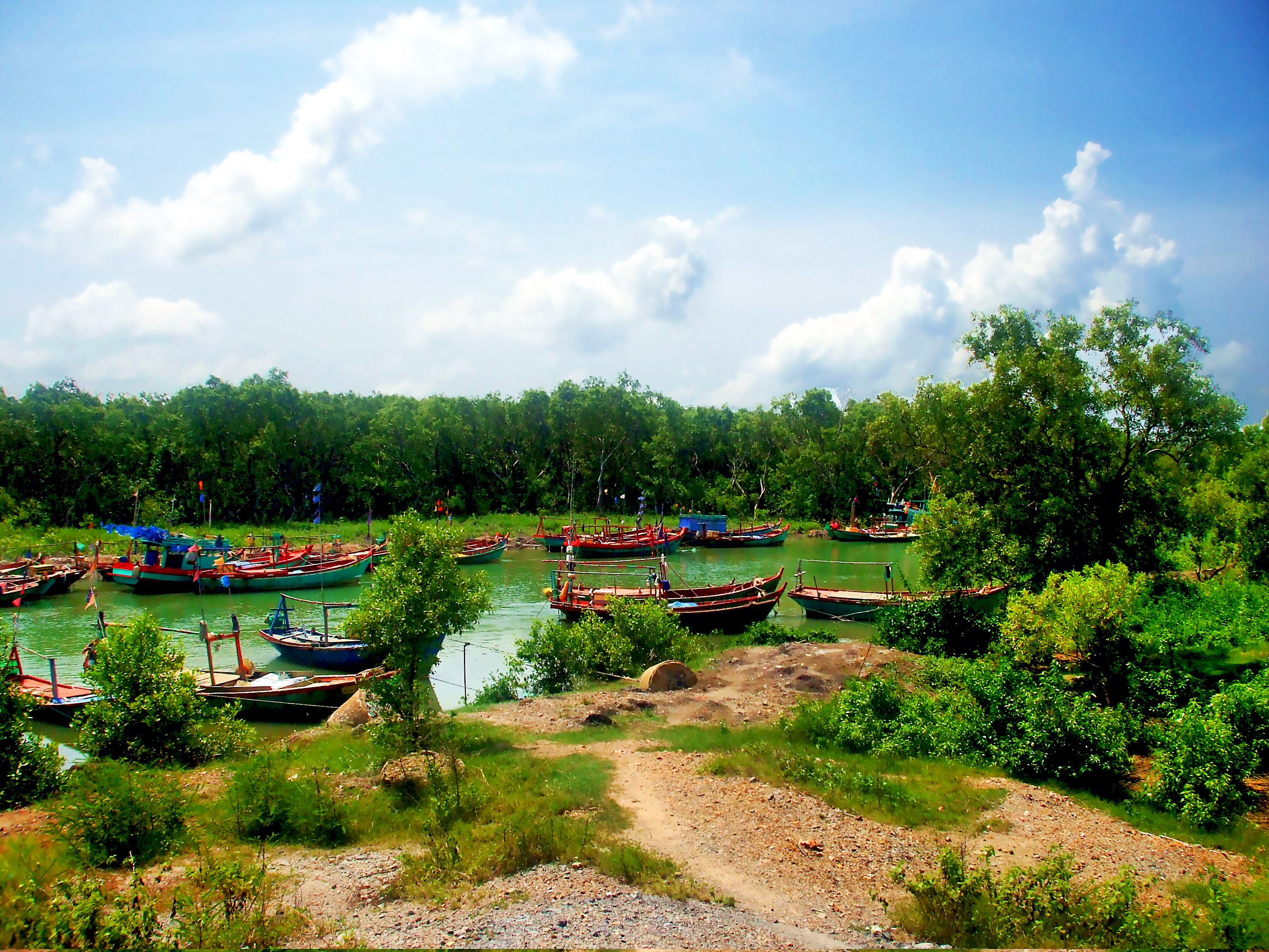 Một số tàu đánh bắt hải sản ven bờ ở Sóc Sơn, thuộc huyện Hòn Đất, tỉnh Kiên Giang, Việt Nam.